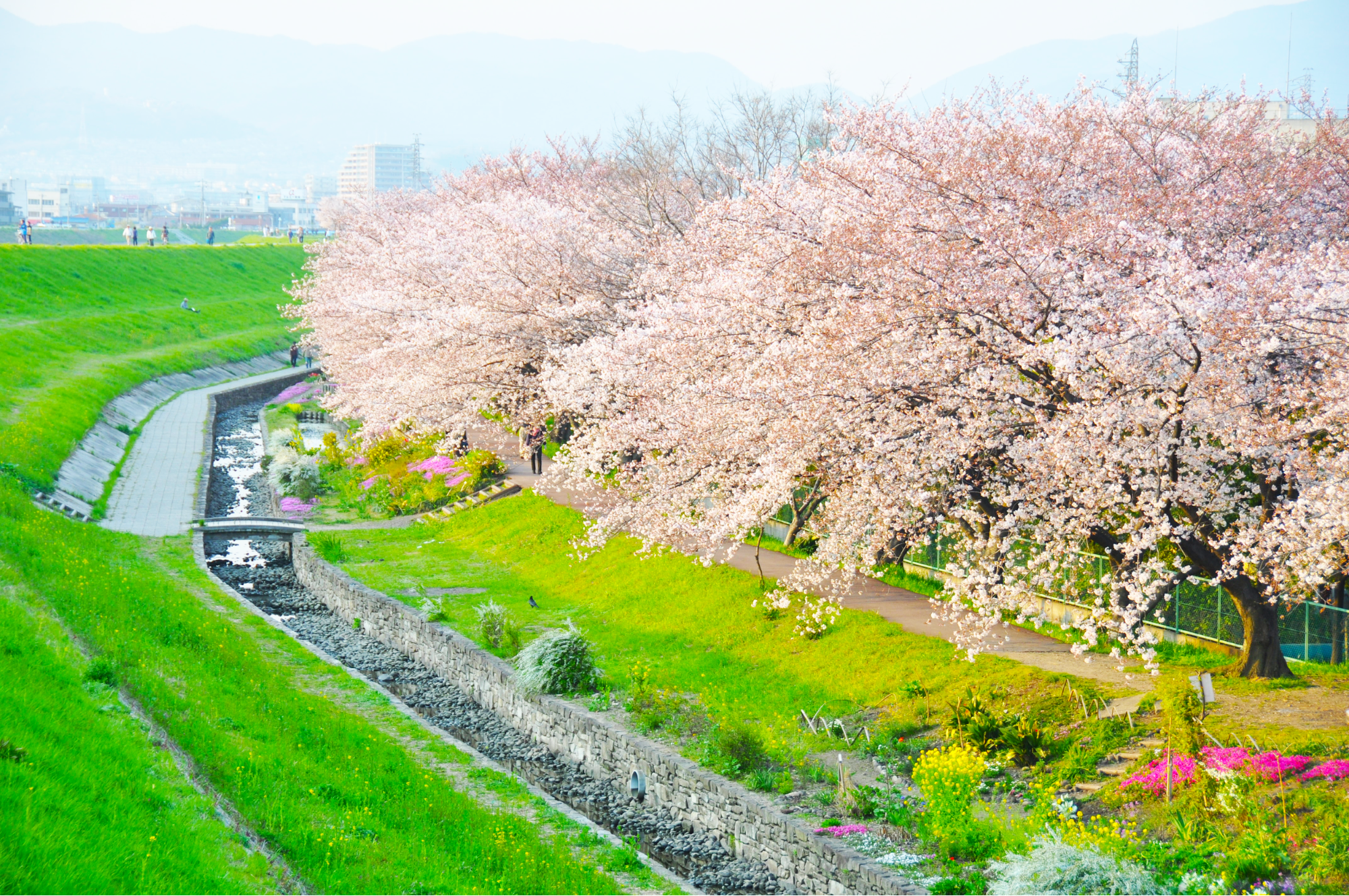 商店街イメージフラワー